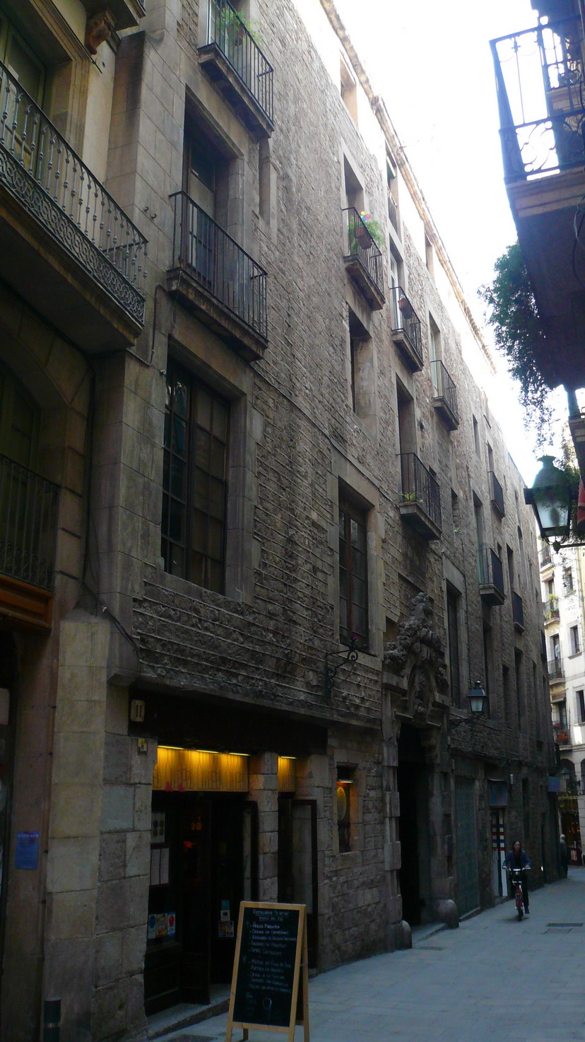 Palau dels Gualbes